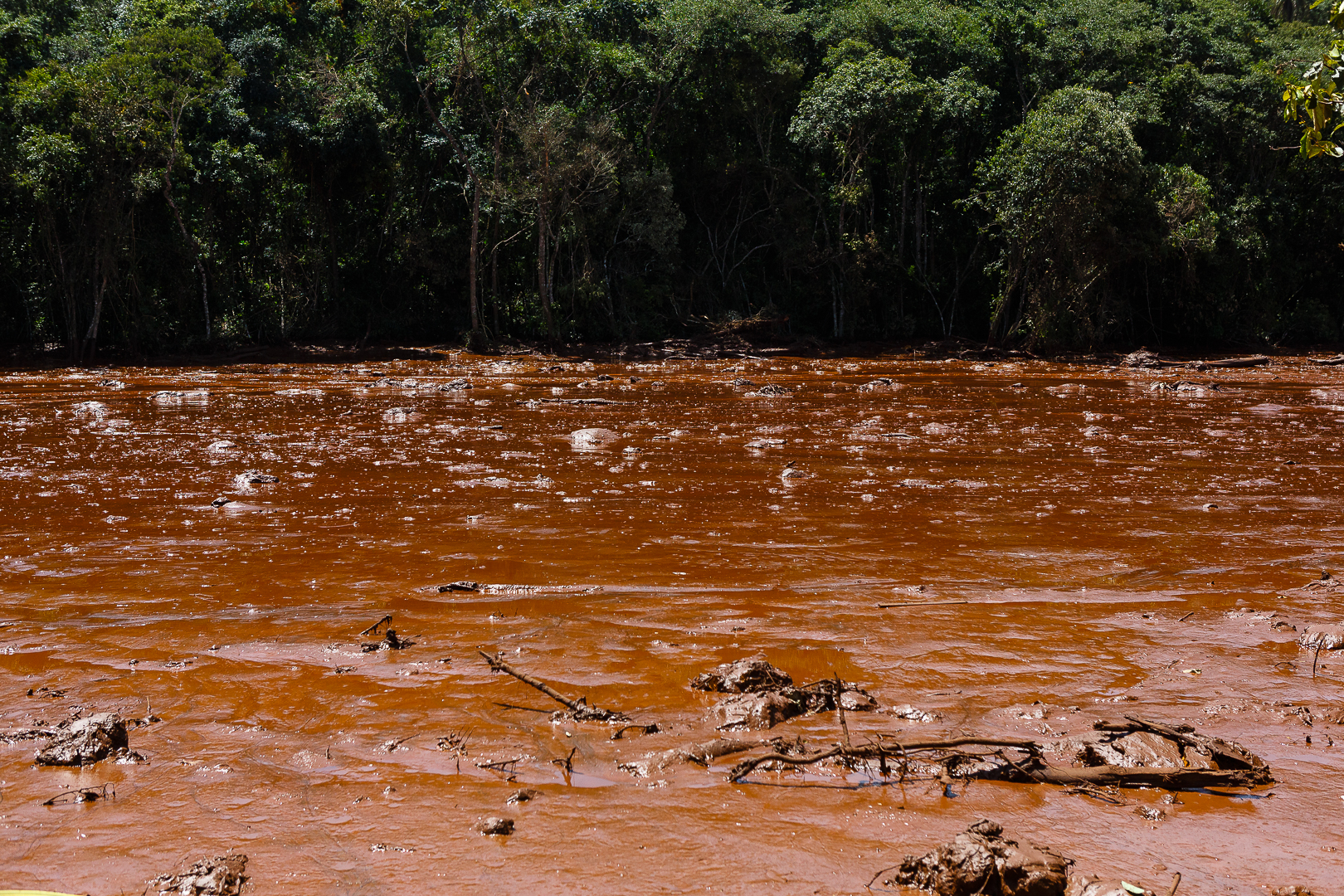 Wiki Expedição Brumadinho - Fevereiro de 2019 - Brumadinho - MG - Brasil.